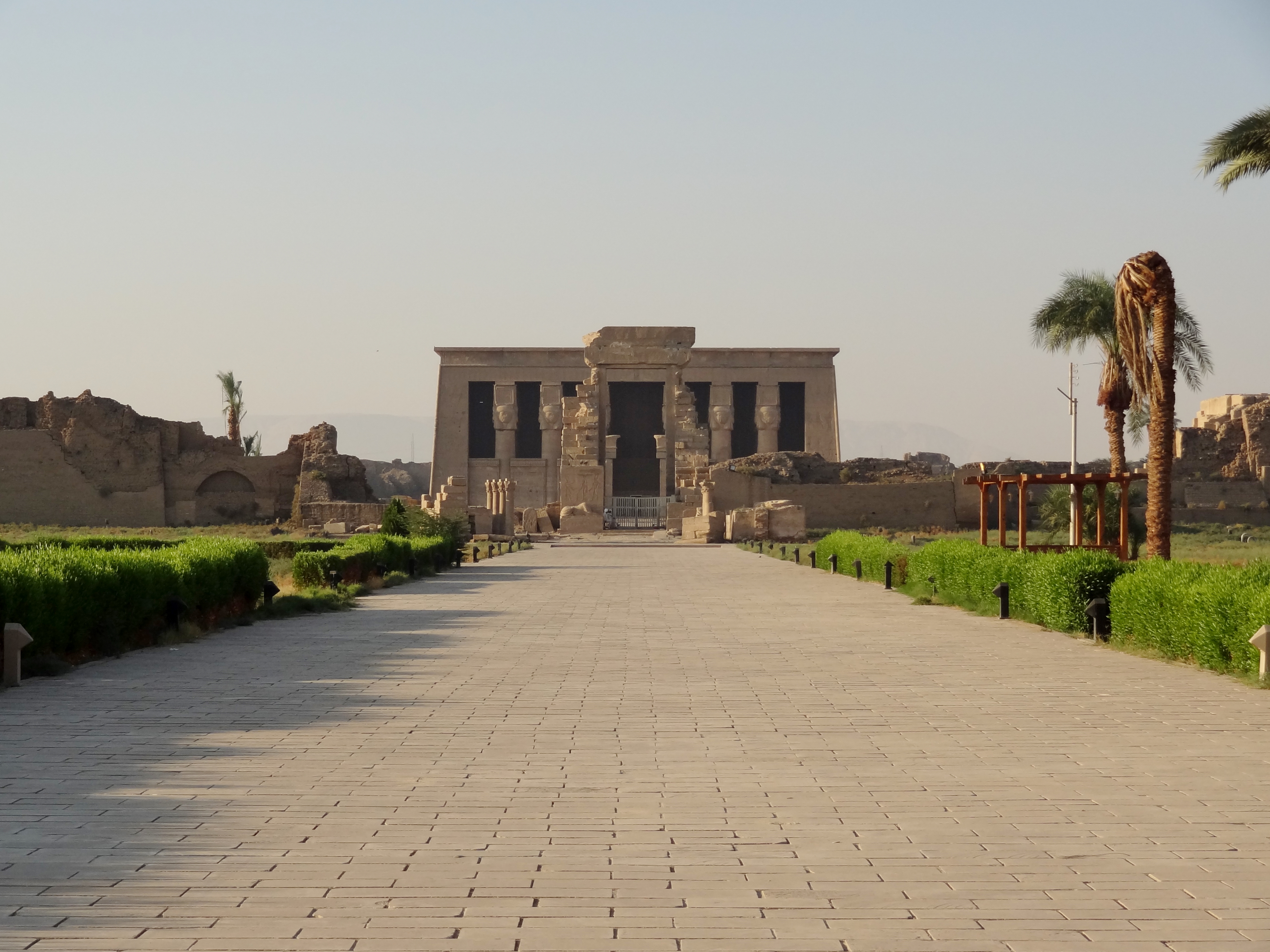 Hathor-Tempel von Dendera, Ägypten